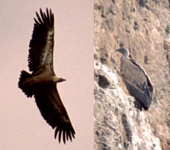 Buitre Leonado Gyps fulvus en las Hoces del Duratón en Segovia (España) Tomada por --JMSE el 2 de julio de 2003 y cedida a Wikipedia